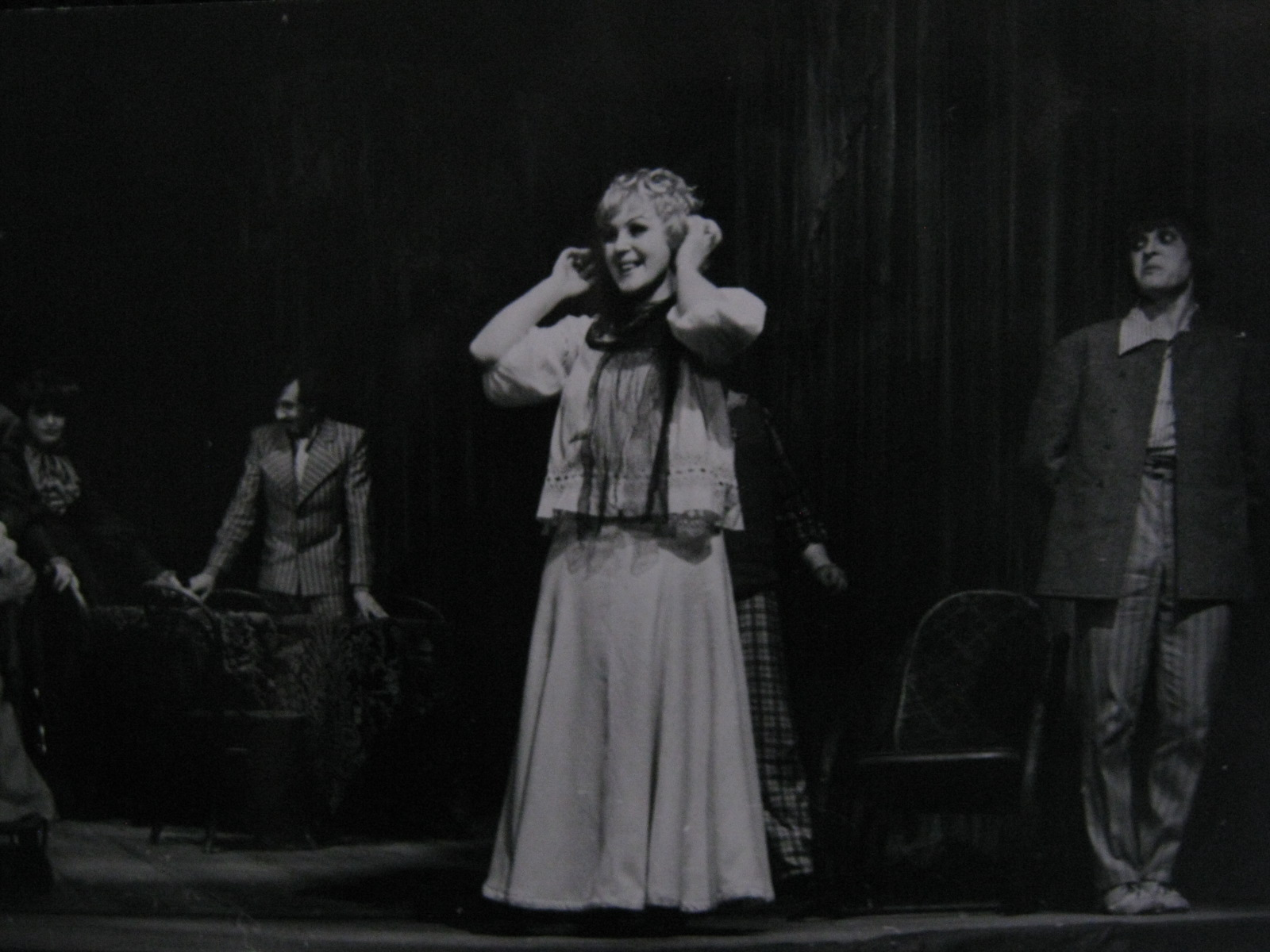 Сцена из спектакля «Житейские мелочи» по мотивам рассказов Антона Павловича Чехова (рассказ Володя) в Челябинском государственном театре юных зрителей, режиссёр-постановщик Геннадий Егоров